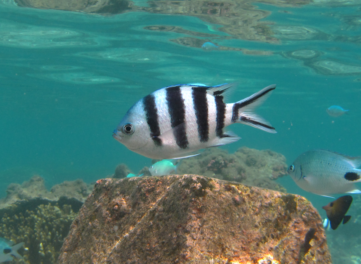 Un sergent-major à queue en ciseaux (Abudefduf sexfasciatus) à la Réunion.